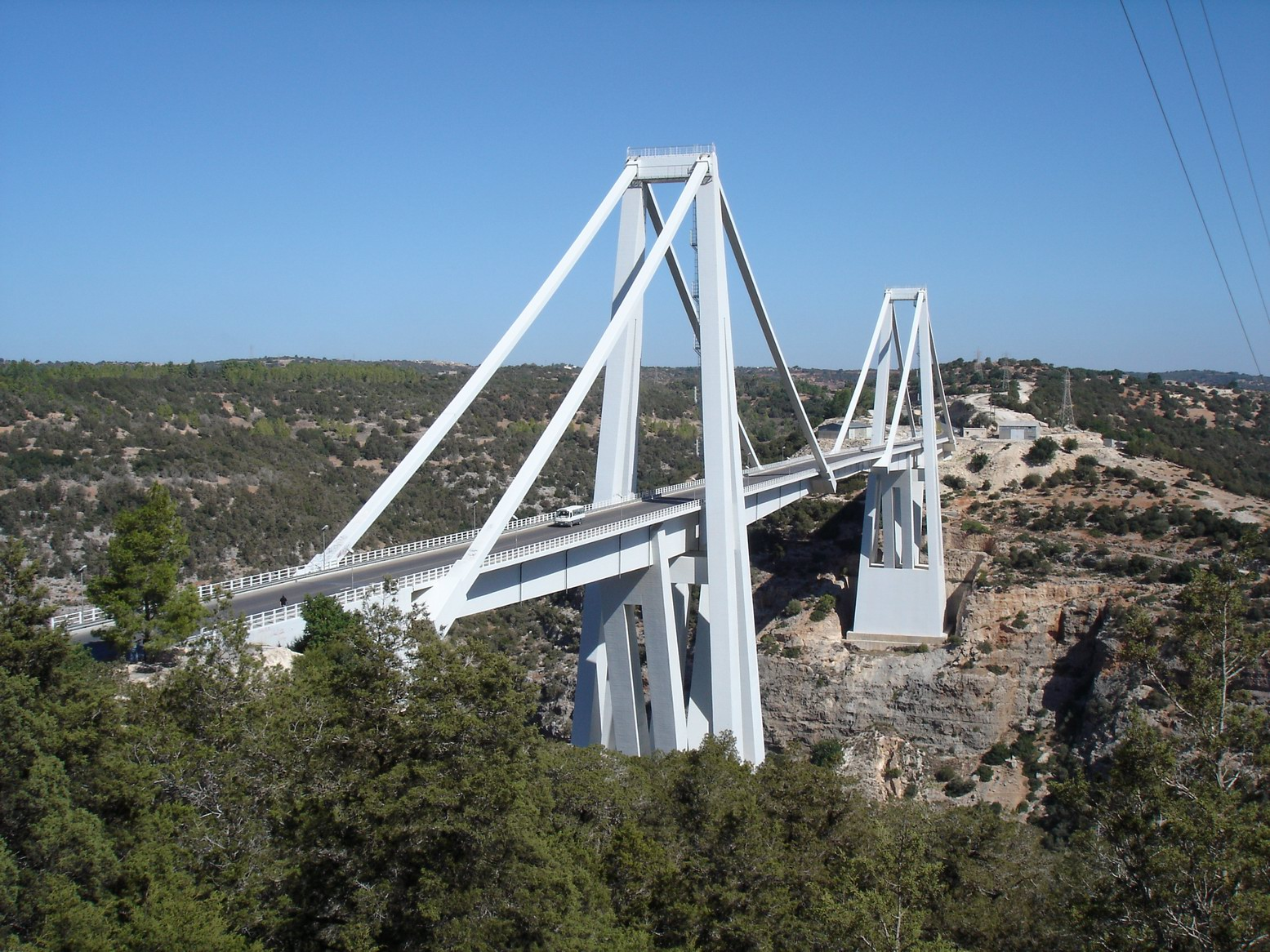 hey gidi günler hey üzerinden defalarca geçtiğim arapcada cebelil akdar köprüsü yani yüksek dağların köprüsü beydağı ve meriç şehirleri arasınada libya by ismail soytekinoğlu